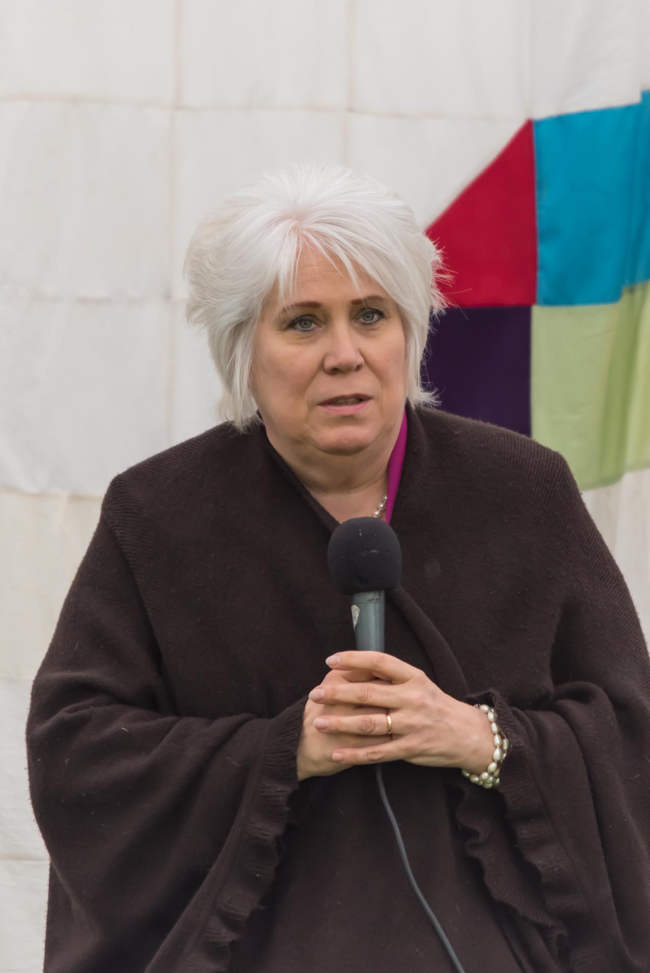 Marina Kaljurand teisel Arvamusfestivalil Narvas. Arutelu teemaks "Sa vaene hüljatud Ida-Virumaa".